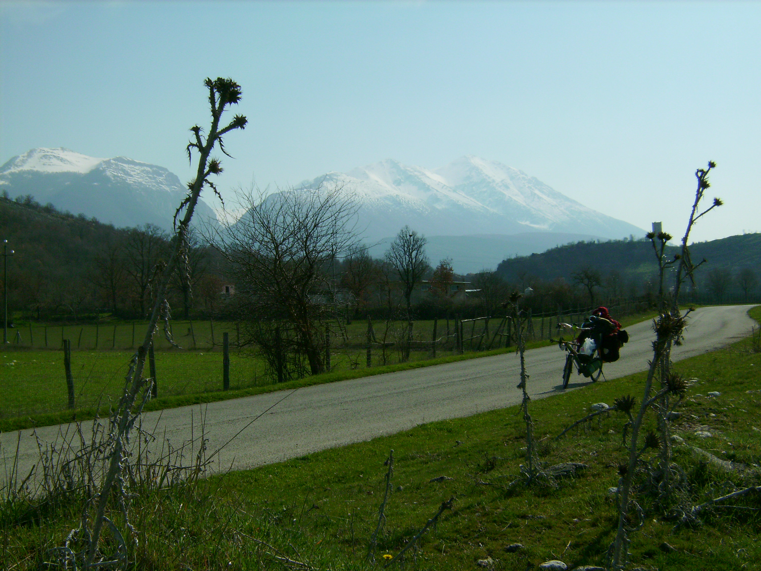 Le montagne circostante (Monti della Duchessa?) fotografate dalla strada provinciale 25, nel comune di Borgorose (provincia di Rieti, Lazio)